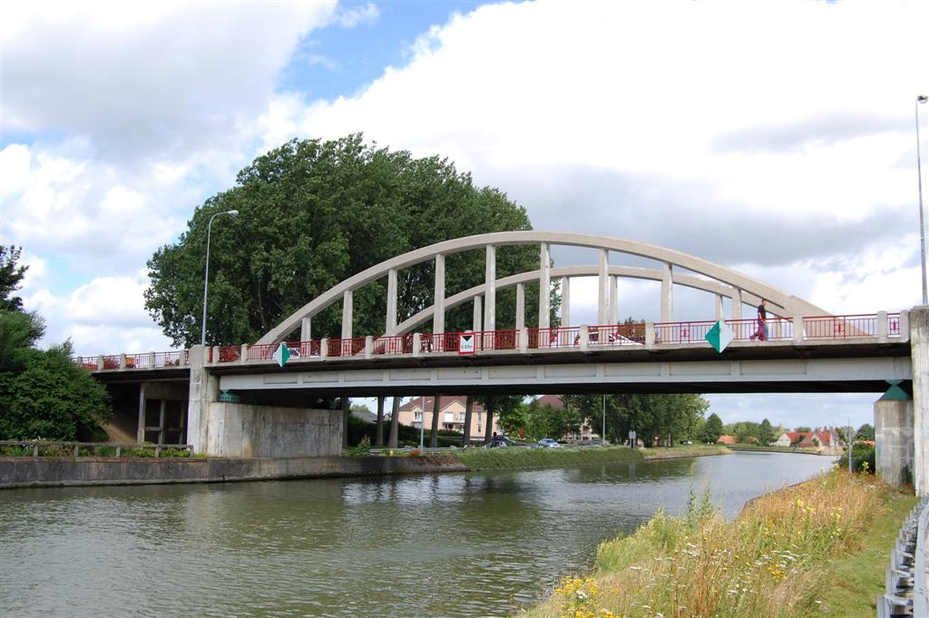 De brug Pont-de-Flandre in Arques over het Canal-de-Neufosse.